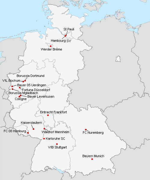 Répartition des clubs en 1.Bundesliga 1989-1990.